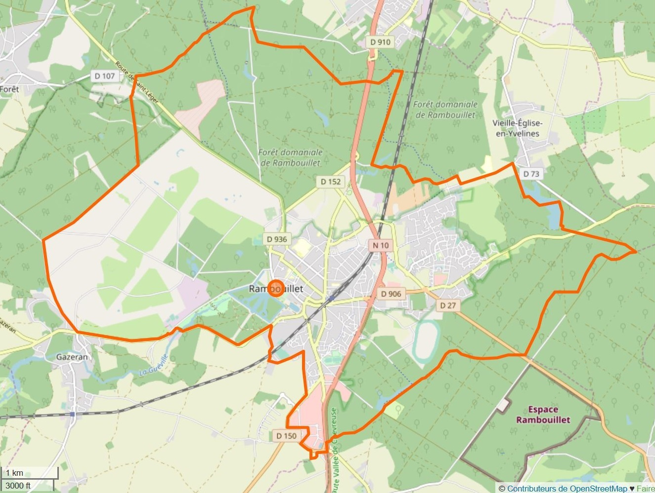 Cette carte a été créée à partir des données du projet Openstreetmap. This map may be incomplete, and may contain errors. Don't rely solely on it for navigation.